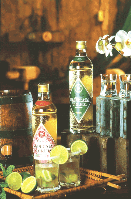 Caipirinha e garrafas de cachaça